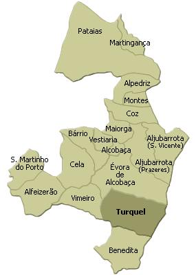 localisation de turquel sur la freguesia de alcobaça